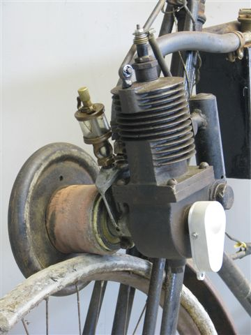 Ixion engine on a Komet motorised bicycle from circa 1902 (see File:Komet-1902-1.jpg).